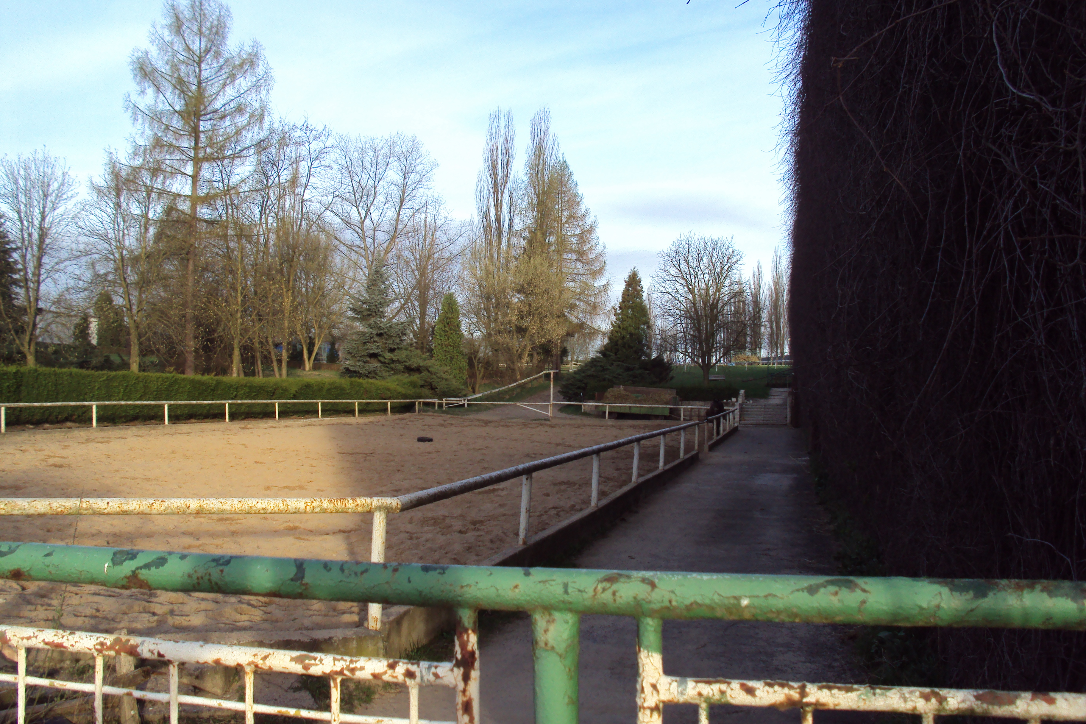 Areál mimoňského hřebčína ze silnice Mimoň-Hradčany